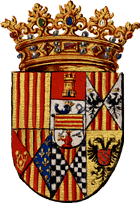 Armas de la Casa de Segorbe